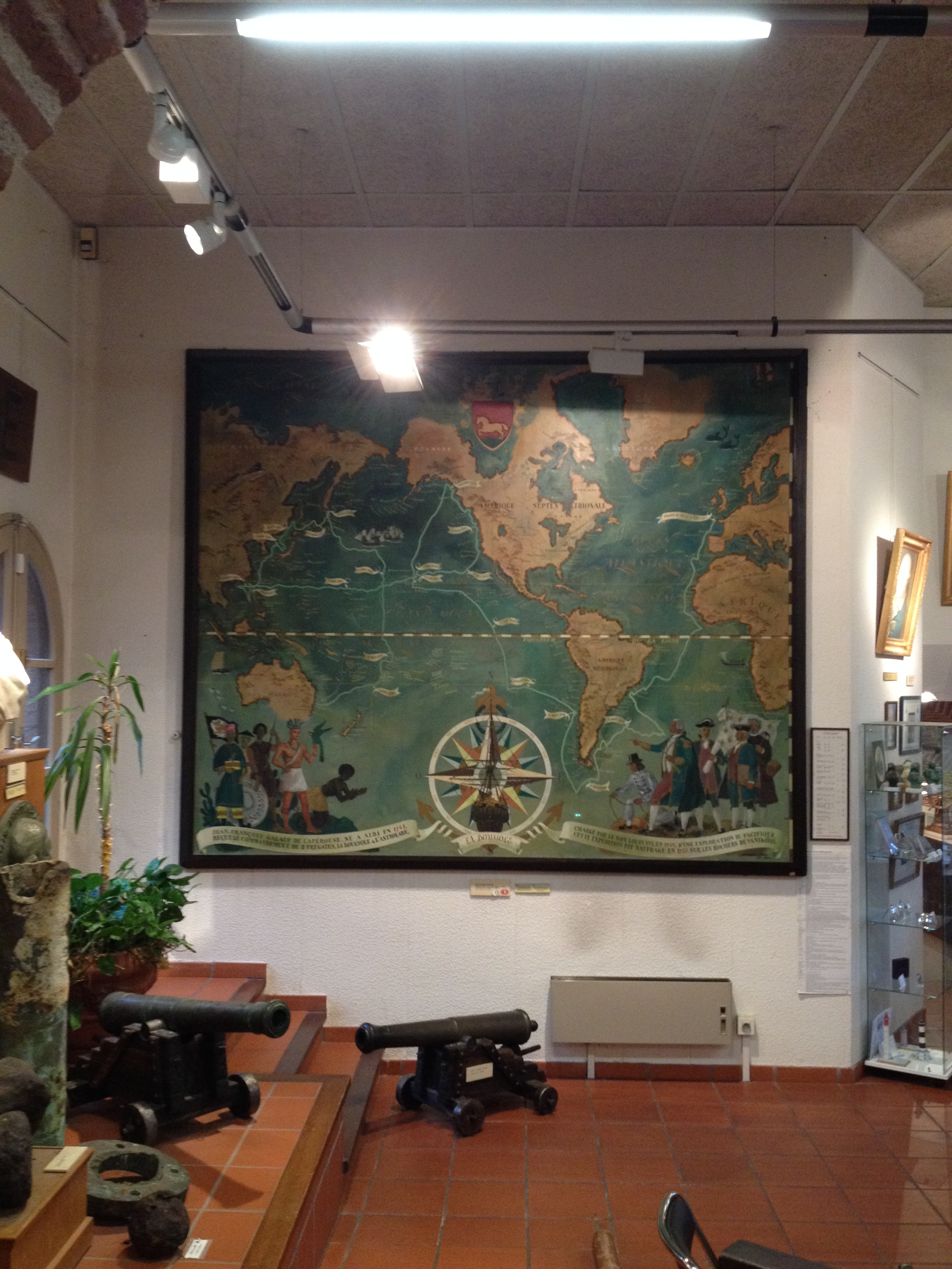 Carte détaillée retraçant le déroulement du voyage de Lapérouse (du lieu de départ à son naufrage, en passant par chaque escale), réalisée par le peintre albigeois Jacques Liozou.